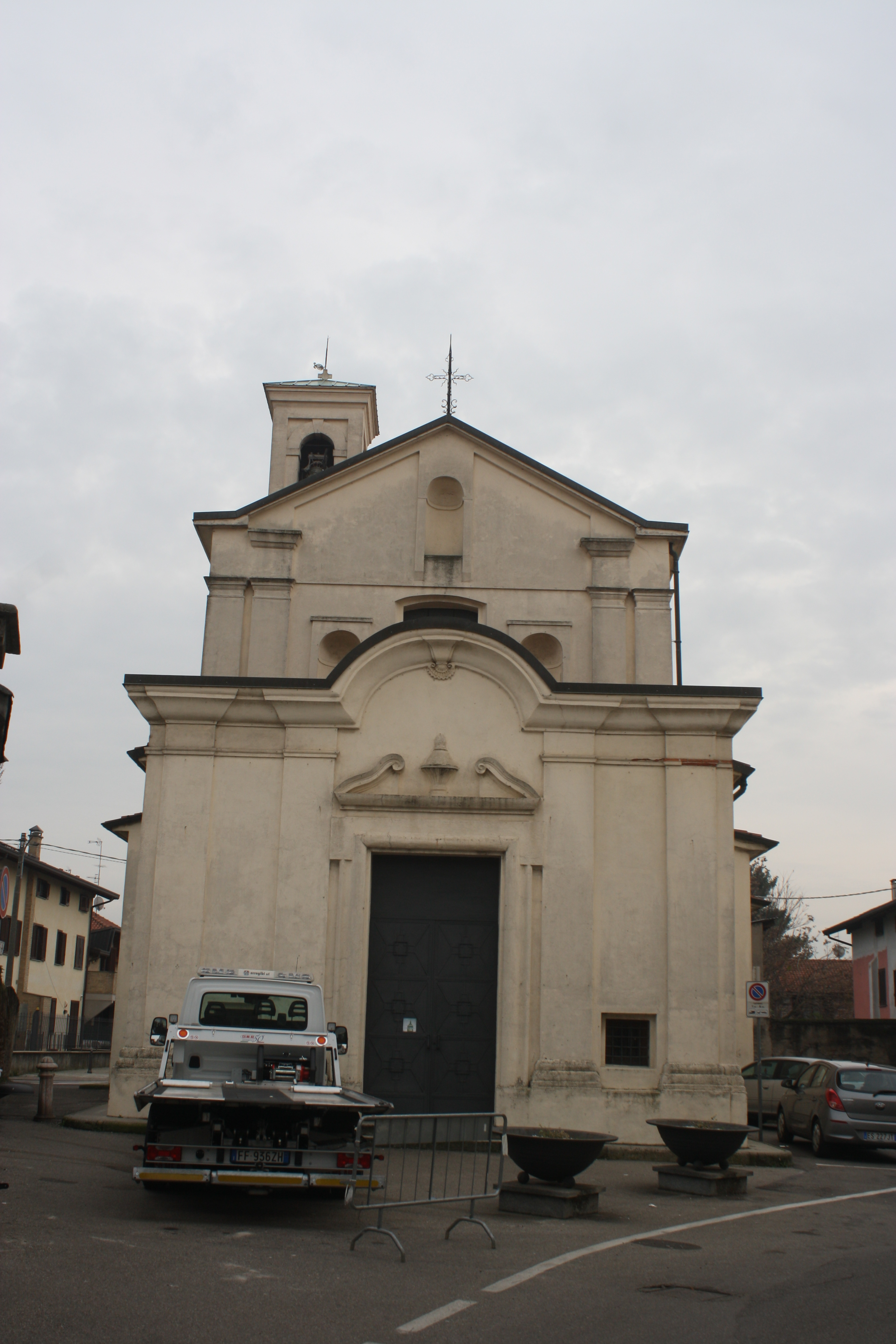 La chiesa dei Santi Cosma e Damiano a Uboldo, in provincia di Varese.